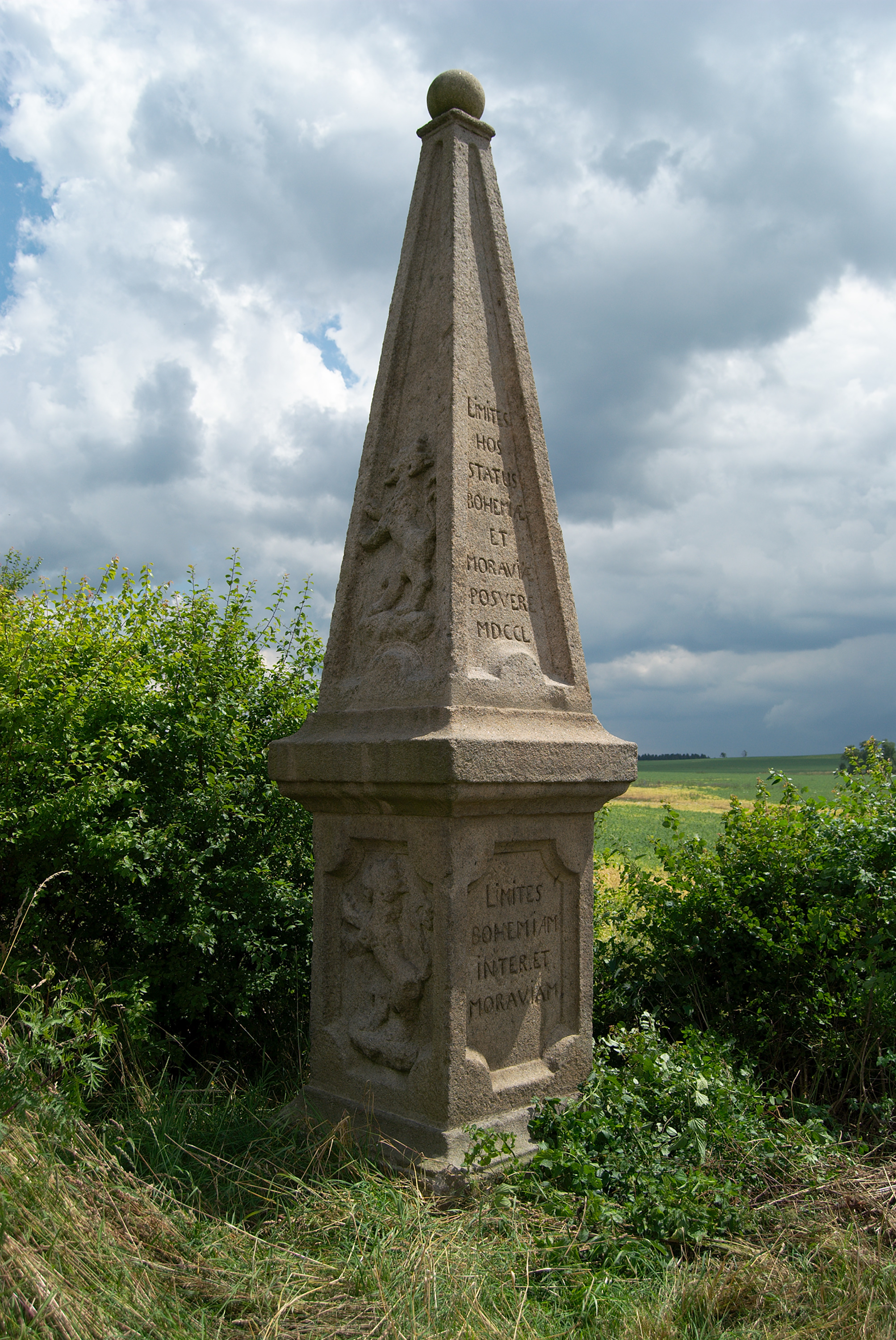 Česko-moravský hraniční pylon. Heroltická, parc. 6167/4, u rozcestí východně od domu Heroltická 2374/54, polní trať Na hranicích, ZSJ Průmyslová zóna Bedřichov.